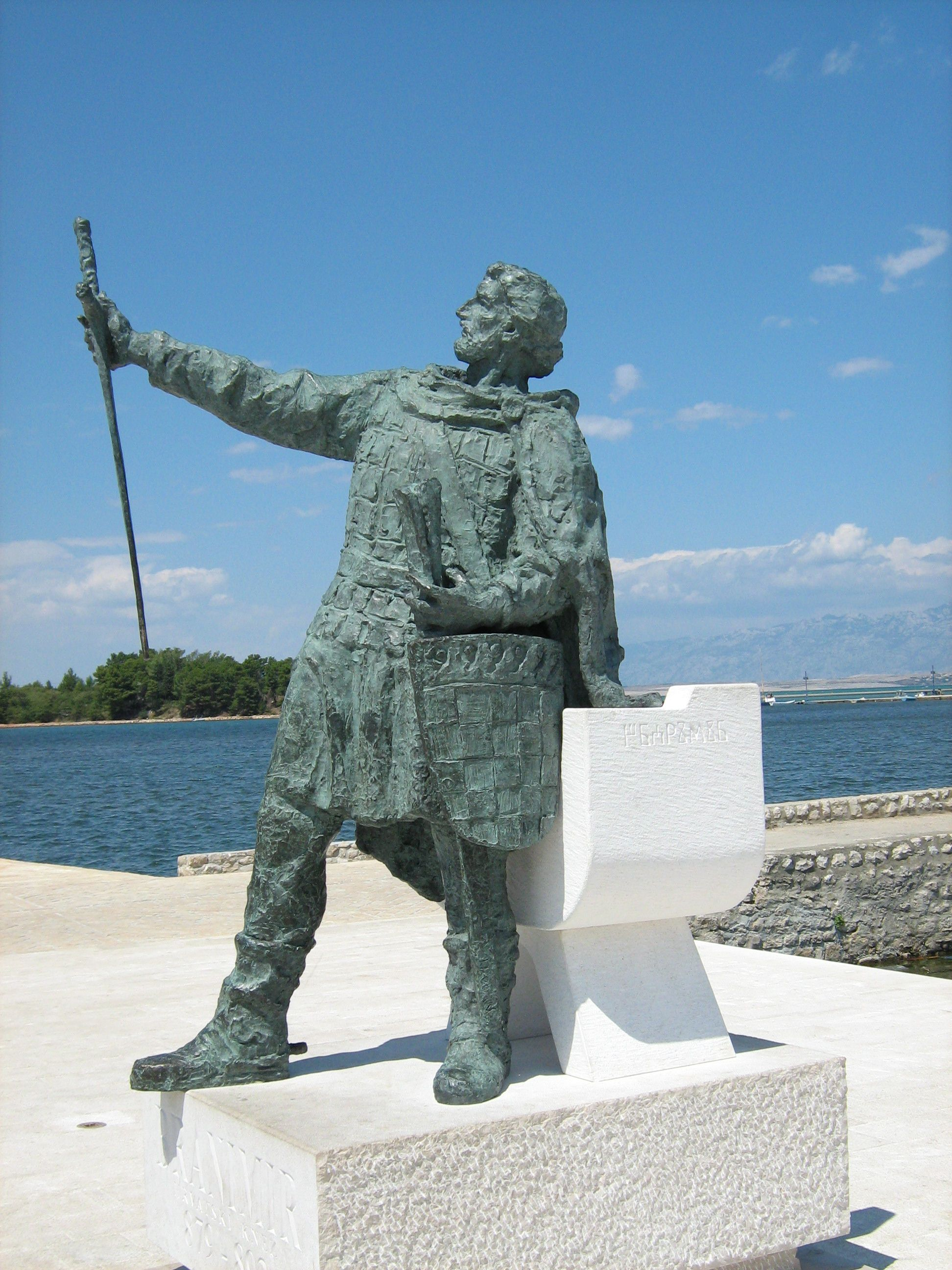 Kip kneza Branimira u Ninu